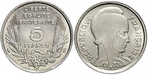 Pièce de 5 francs français en nickel « type Bazor ».